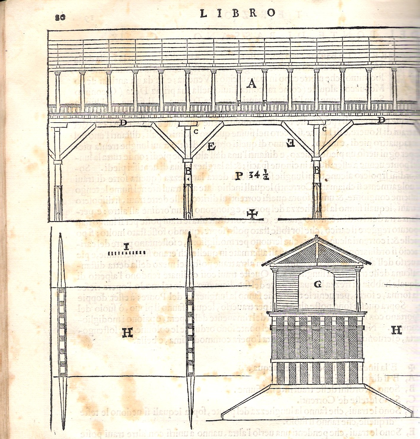 Andrea Palladio, "Quattro libri dell´architettura", prima edizione 1570 - libro III - Ponte di Bassano - Disegno